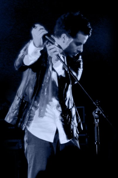 Emre Aydin @ Yeni Melek, Istanbul